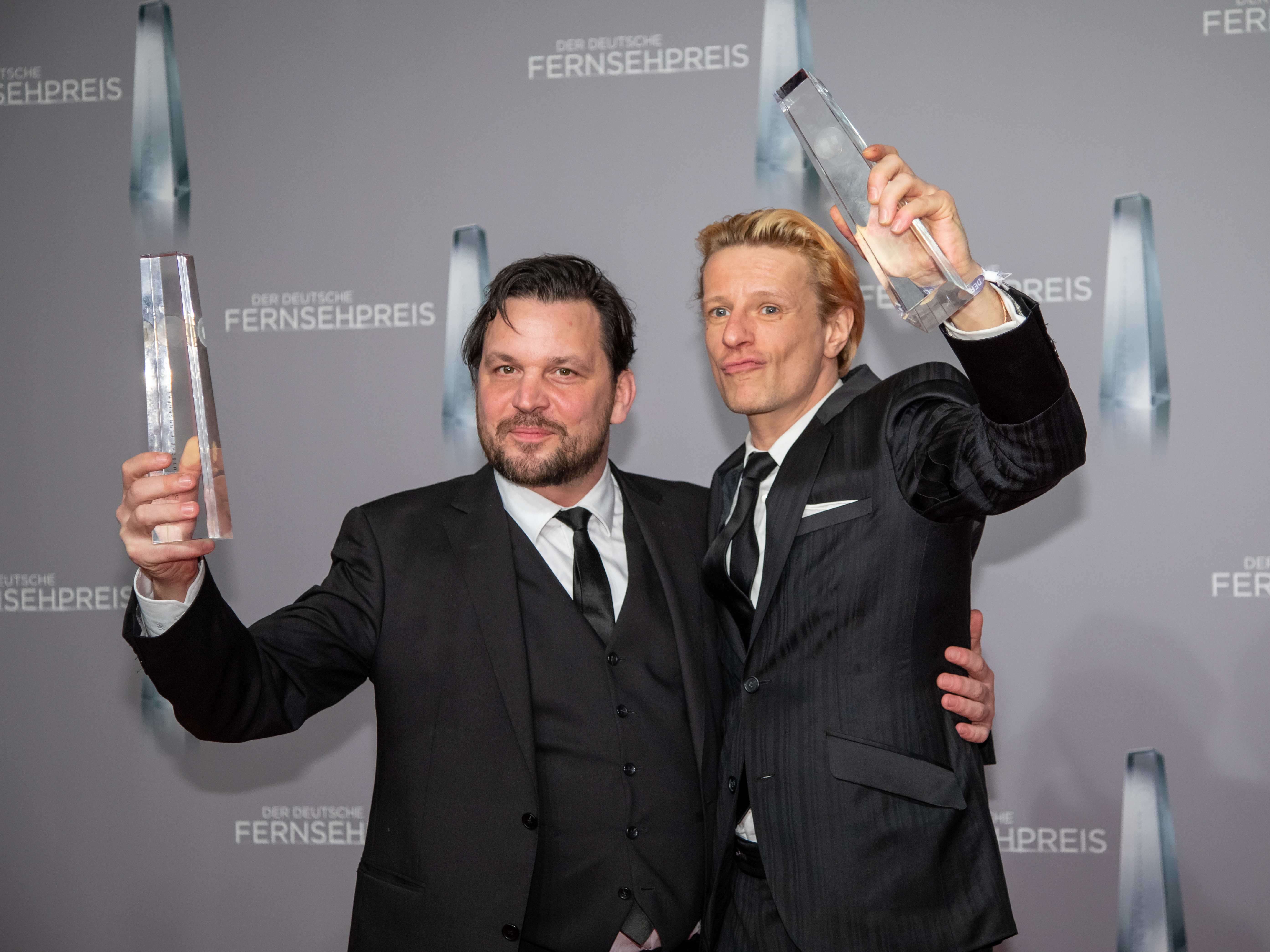 Sascha Alexander Gersak; Alexander Scheer beim Deutschen Fernsehpreis 2019 in der Düsseldorfer Rheinterrasse